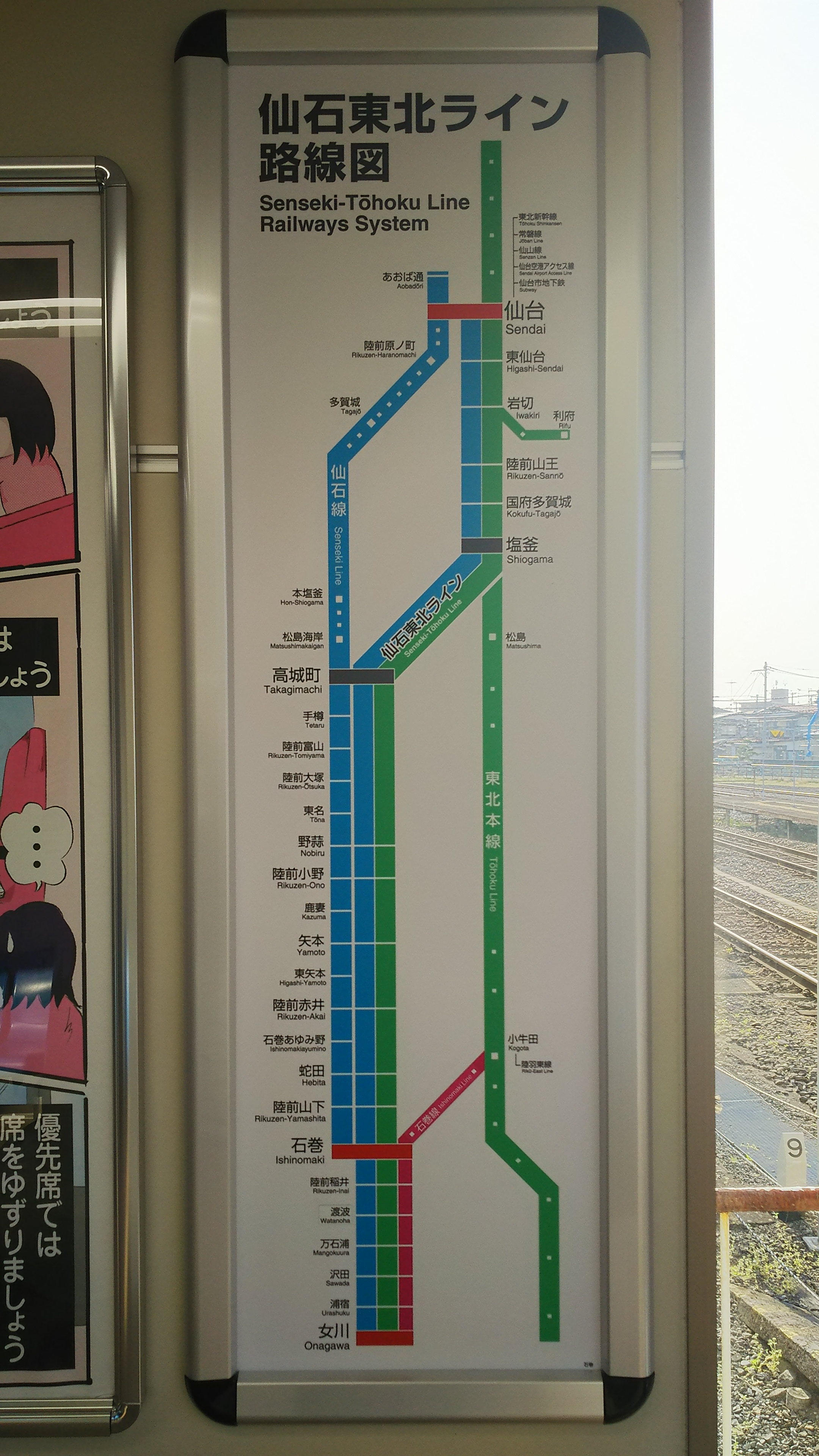 仙石東北ライン・路線図（石巻駅）